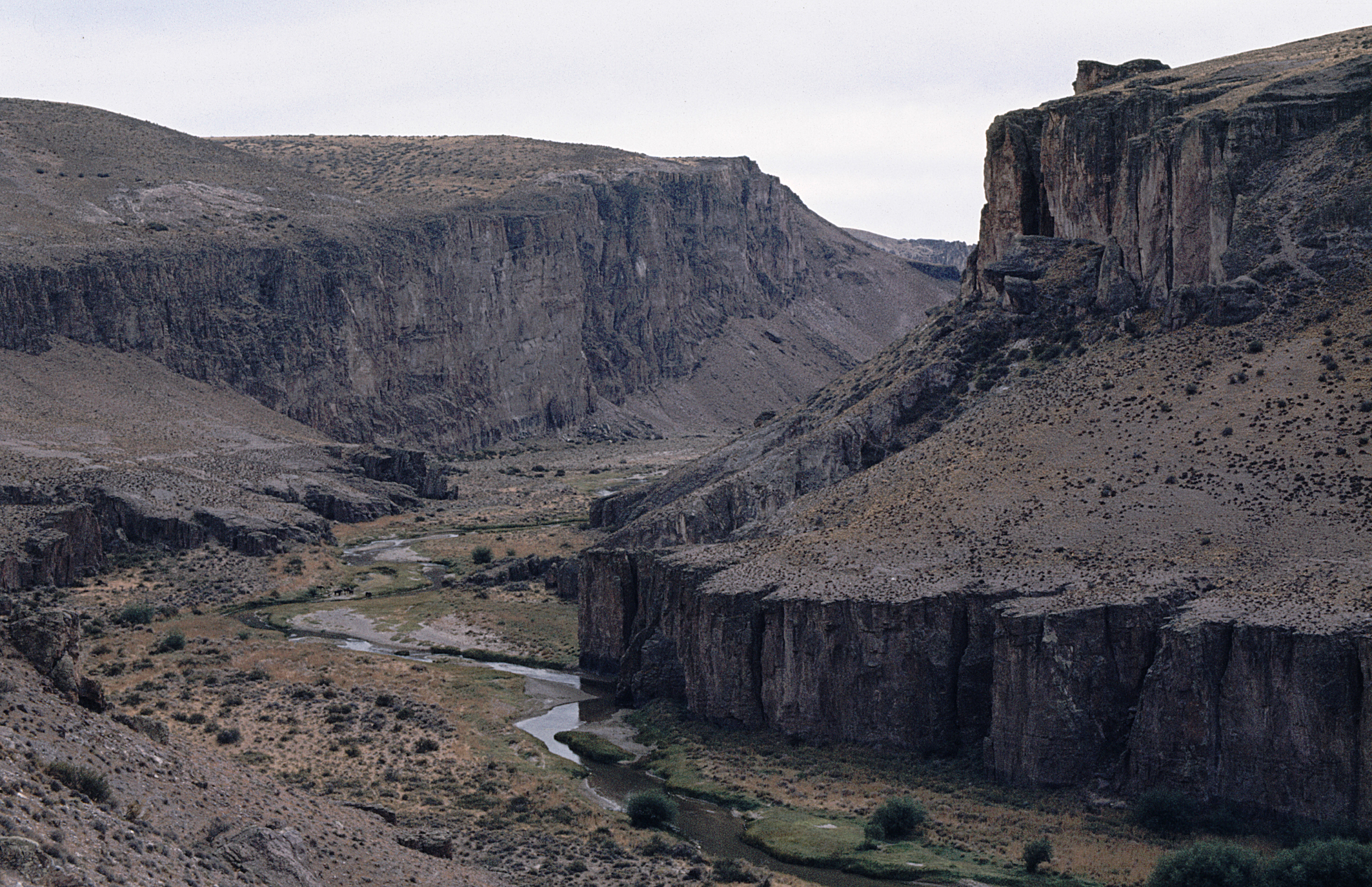 Río Pinturas, Argentinien